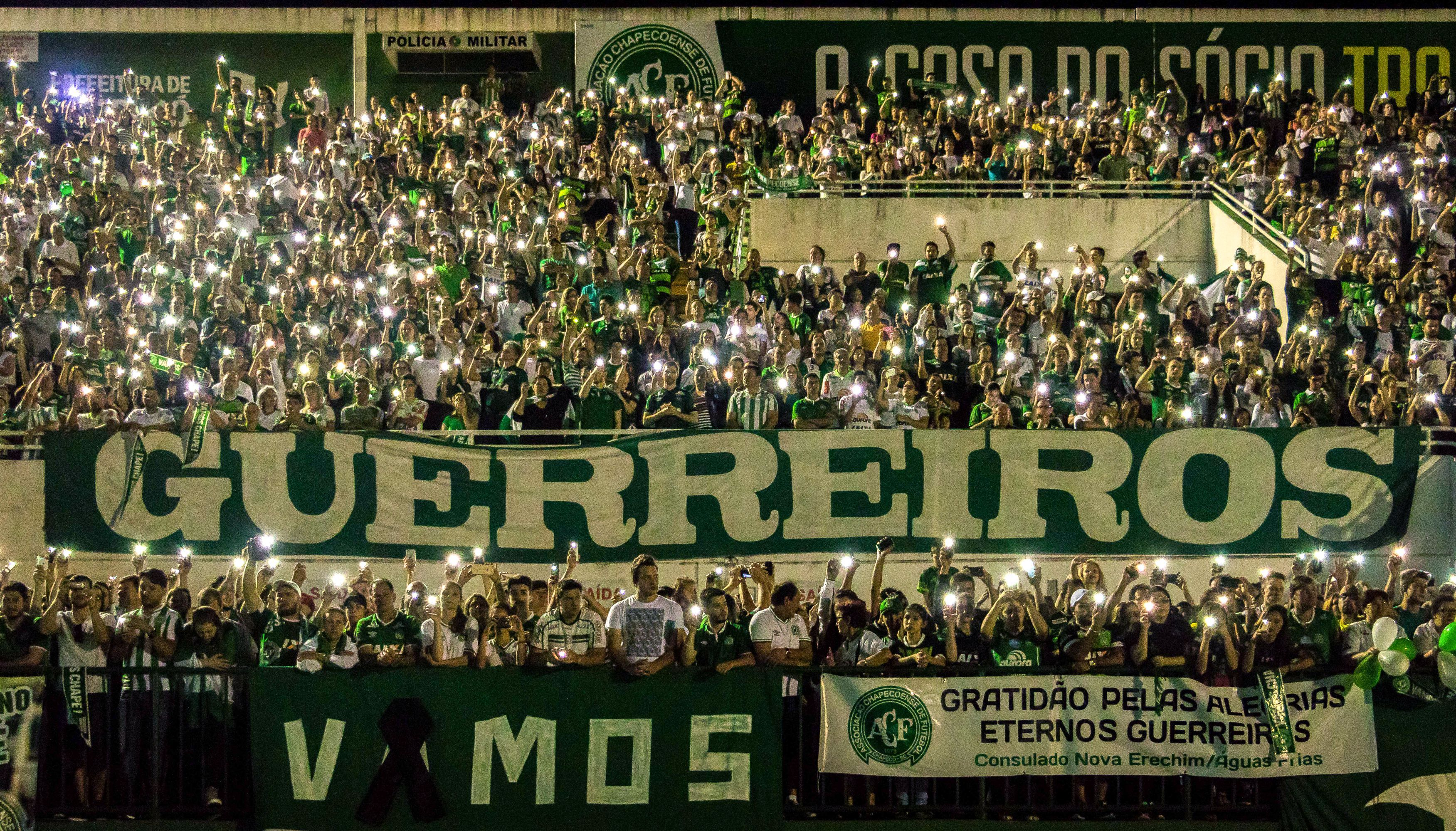 Chapecó - Um tributo à Chapecoense e às vítimas da tragédia com o voo da delegação, na madrugada de terça-feira (29), tomou a Arena Condá, estádio da Chapecoense.